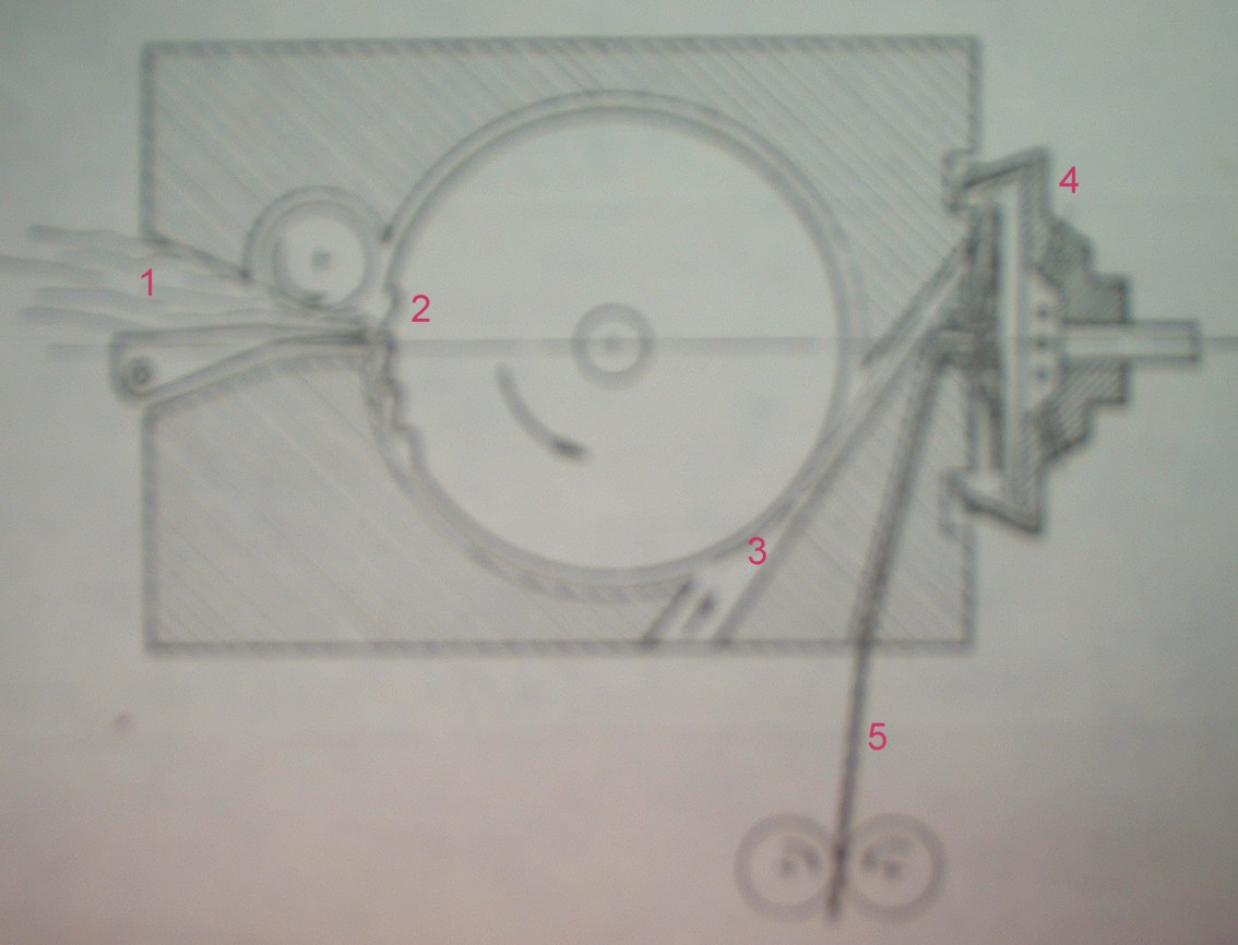 Schema der OE-Spinnstelle